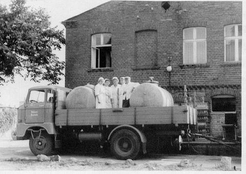 20. Nachdem die Molkerei zur Sammelstelle wurde, holte täglich ein W 50 mit Milchtanks die gesammelte und gekühlte Milch zur Weiterverarbeitung ab, alle Trinkmilch wurde in Flaschen bzw Kästen (siehe Rampe) gebracht.